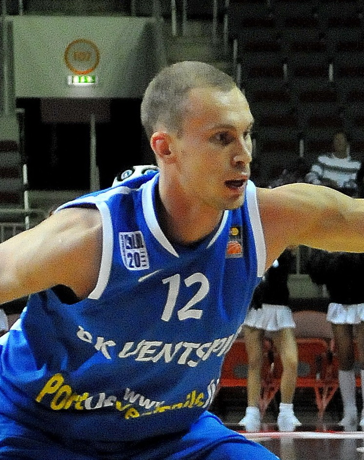 Akselis Vairogs